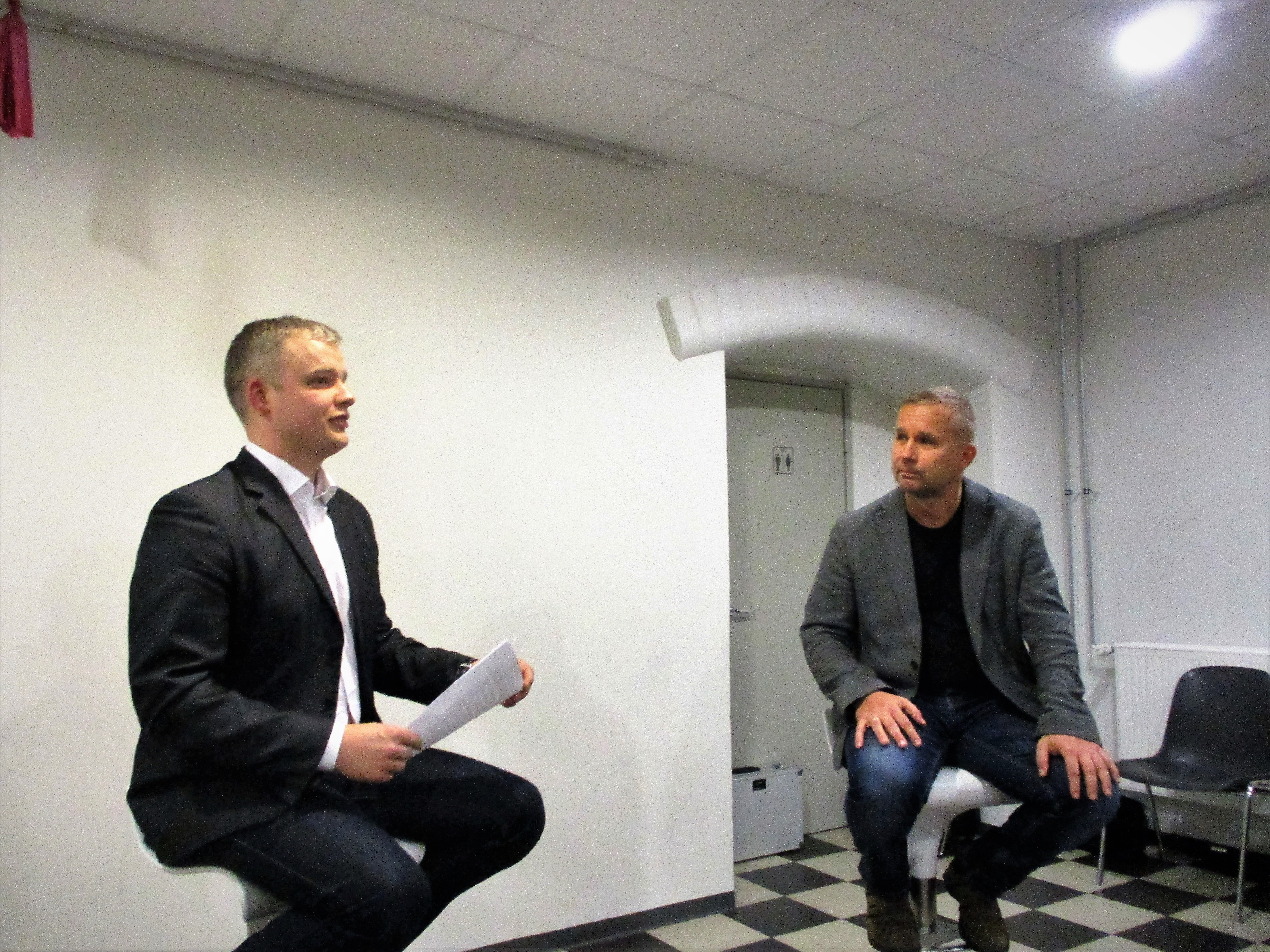 Viljandi Kultuuriakadeemia Vilma majas toimus inspiratsiooniüritus "Ettevõtlikuna maailma", veebruar 2018 a.